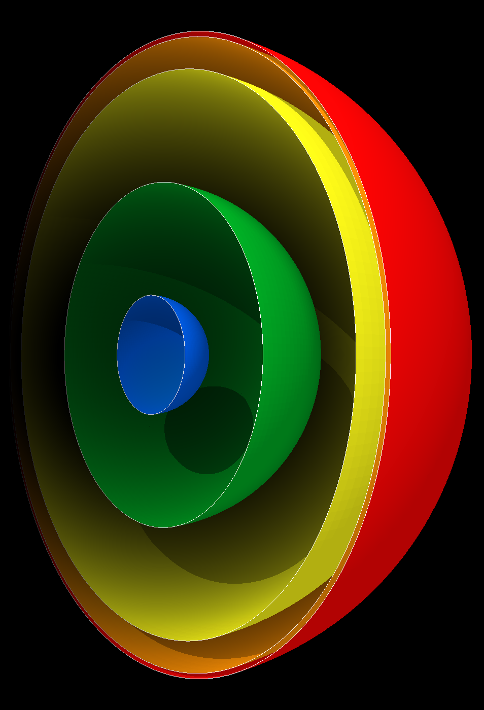 Строеж на планетата Земя в естествени пропорции (съобразно настоящите научни представи). Софтуер - SketchUp.